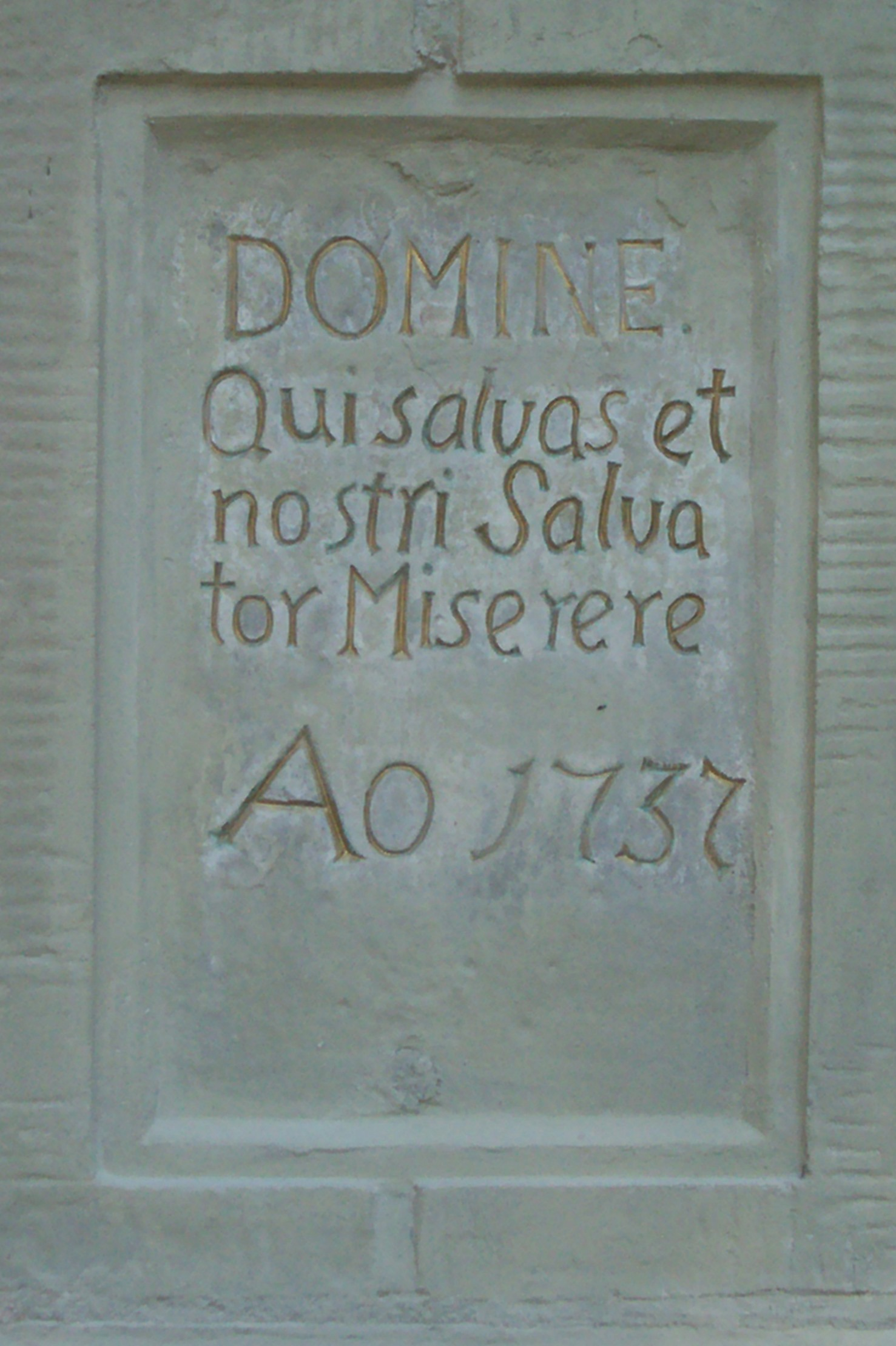 Tablica na figurze Chrystusa trzymającego kulę zięmską, zlokalizowanej przed Kościołem Najświętszego Serca Jezusowego w Olsztynie